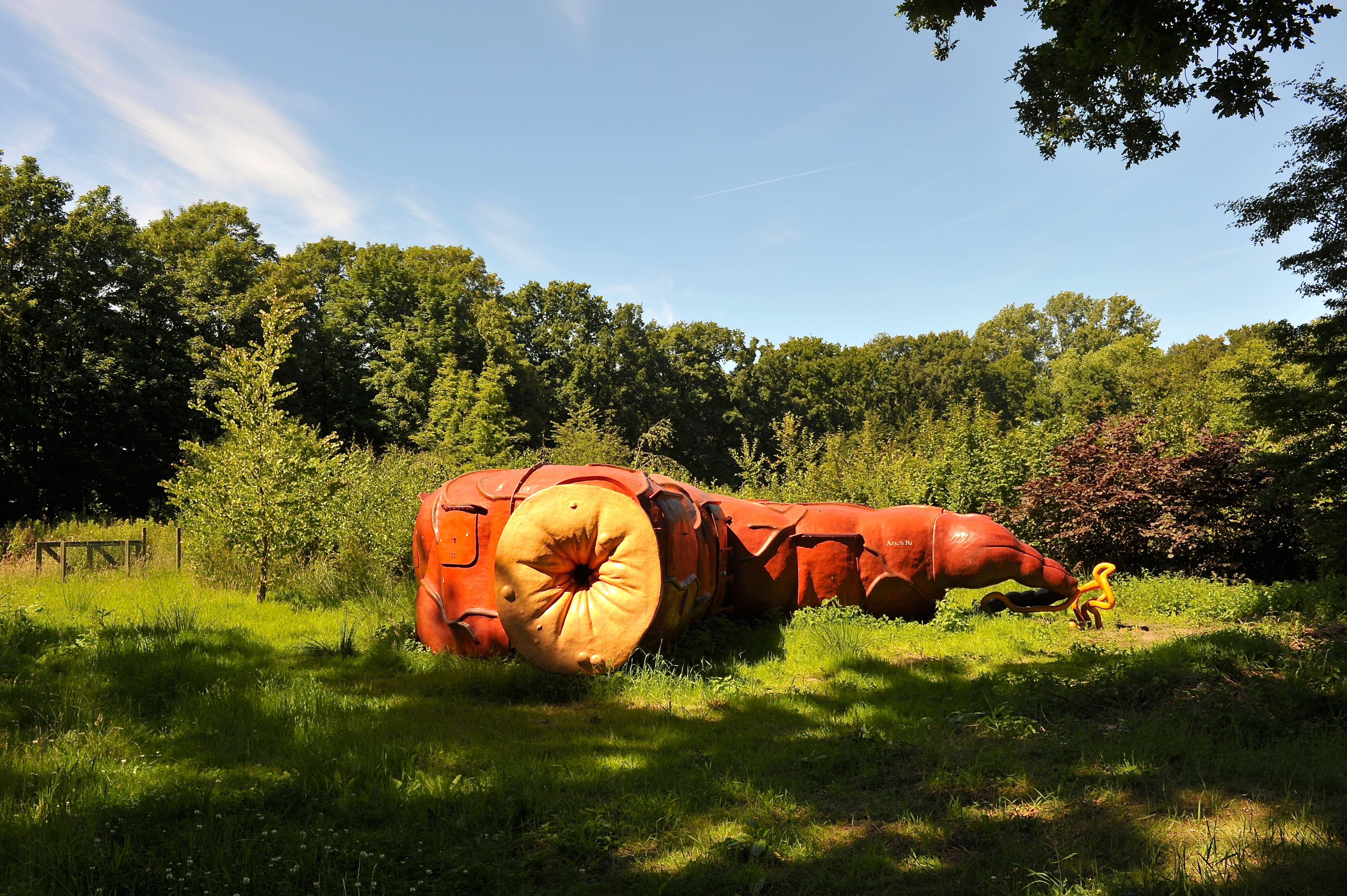 Barrectum. Tentoonstelling 'Vrijstaat'.